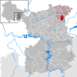 Lemnitz in Thuringia - Saale-Orla-Kreis